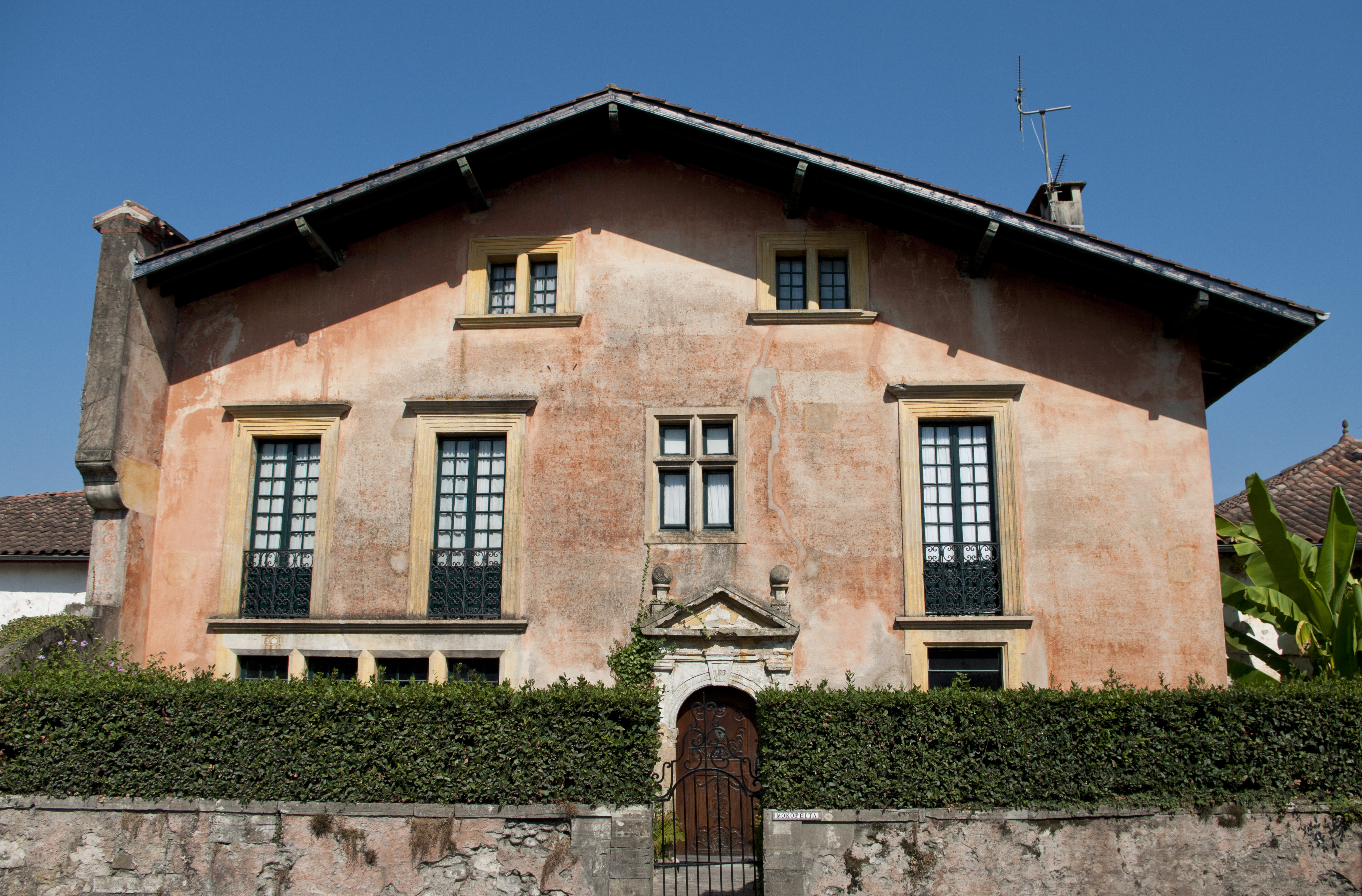 La maison Mokopeita se situe à Ustaritz, une commune Française des Pyrénées-Atlantiques .